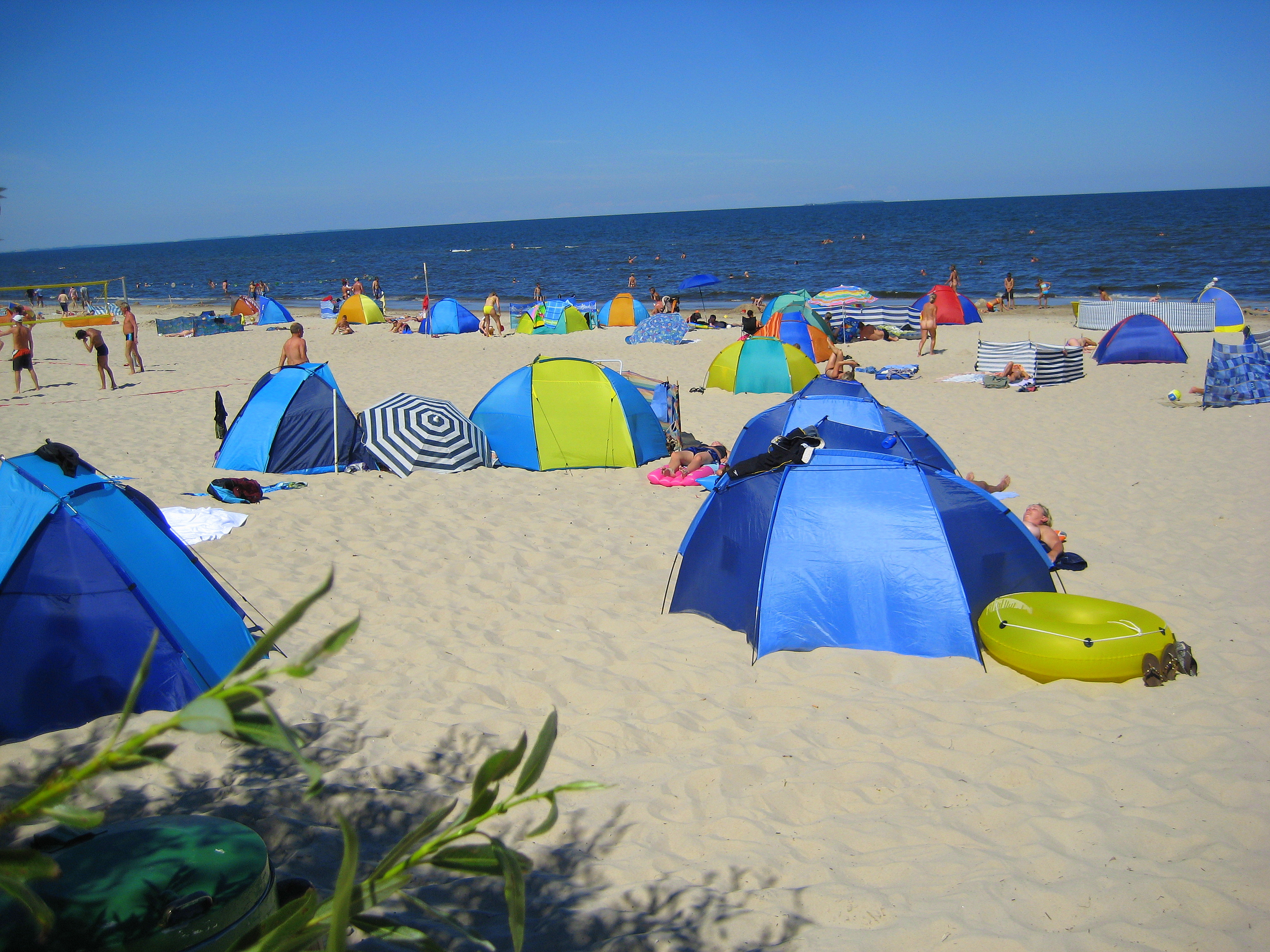 Zinnowitz August 08